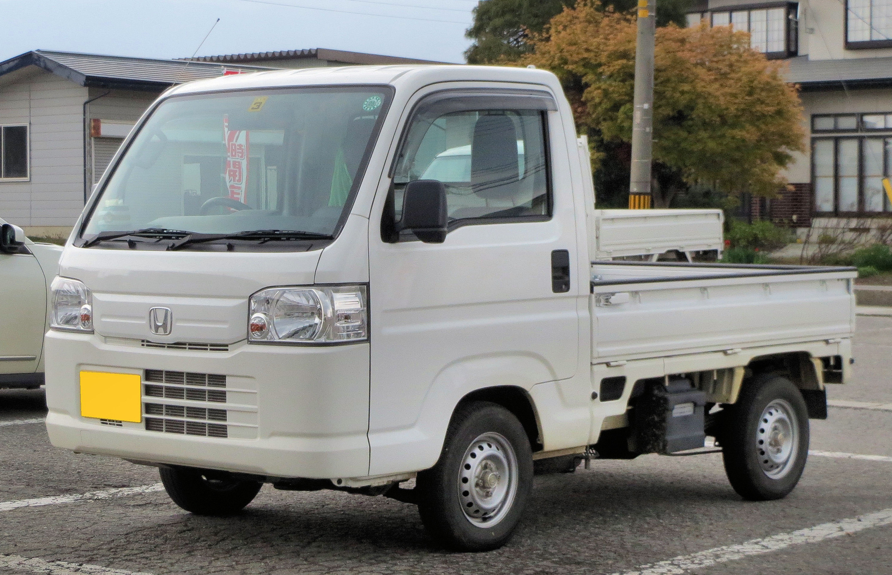 ホンダ・アクティトラック4WD